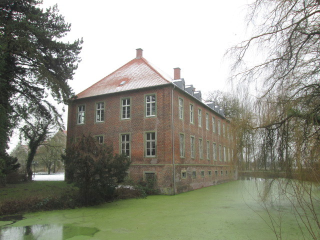 Hamm, Haus Uentrop